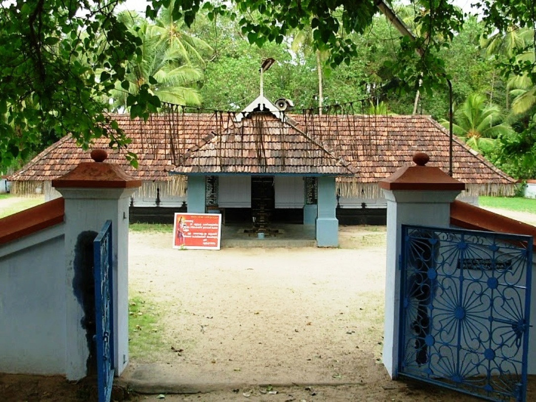 മുറ്റിച്ചൂർ കല്ലാറ്റുപുഴ ശിവക്ഷേത്രം